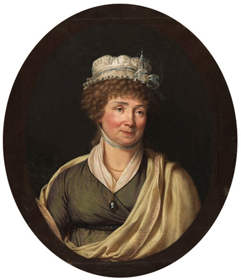 Portrait de la marquise de Grollier par Francois Xavier Fabre (Montpelier 1766-1837)